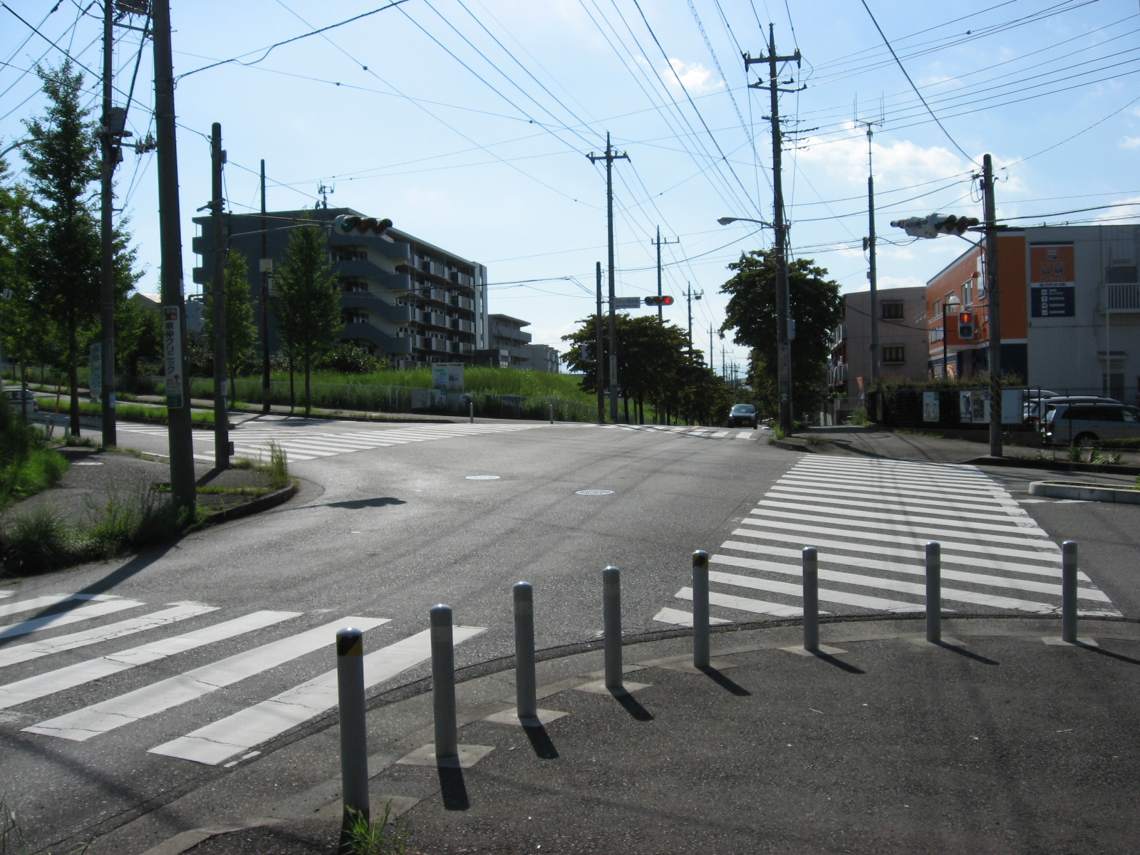 荏子田の風景